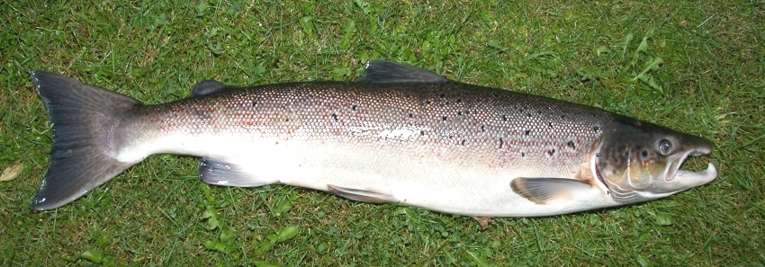 Das Bild zeigt einen Atlantischen Lachs, der im Sommer 2005 in Schleswig-Holstein (Stör) mit der Handangel gefangen wurde. Der Milchner (männliches Tier) besitzt bereits ein ausgeprägtes "Laichkleid": während seines Aufenthaltes im Meer (hier vermutlich Nordsee und Atlantik) hat er seine Farbe gewechselt von Silber zu Braun. Zusätzlich hat sich bei seinem Unterkiefer noch der "Laichhaken" entwickelt, der hier recht gut zu erkennen sein dürfte. Bei einer Länge von 70+cm brachte der Fisch ein Gewicht von 3,5kg+ auf die Waage.